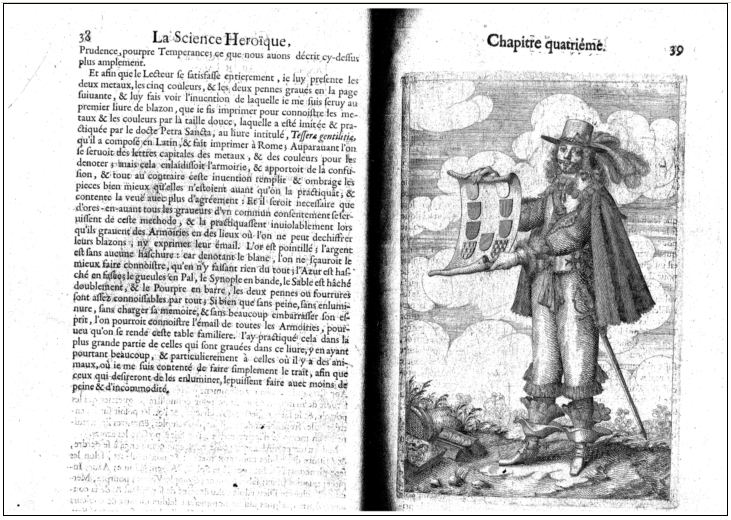 Marcus Vulson de la Colombiere 1644-es művének 38. lapja és vonalkázási rendszere